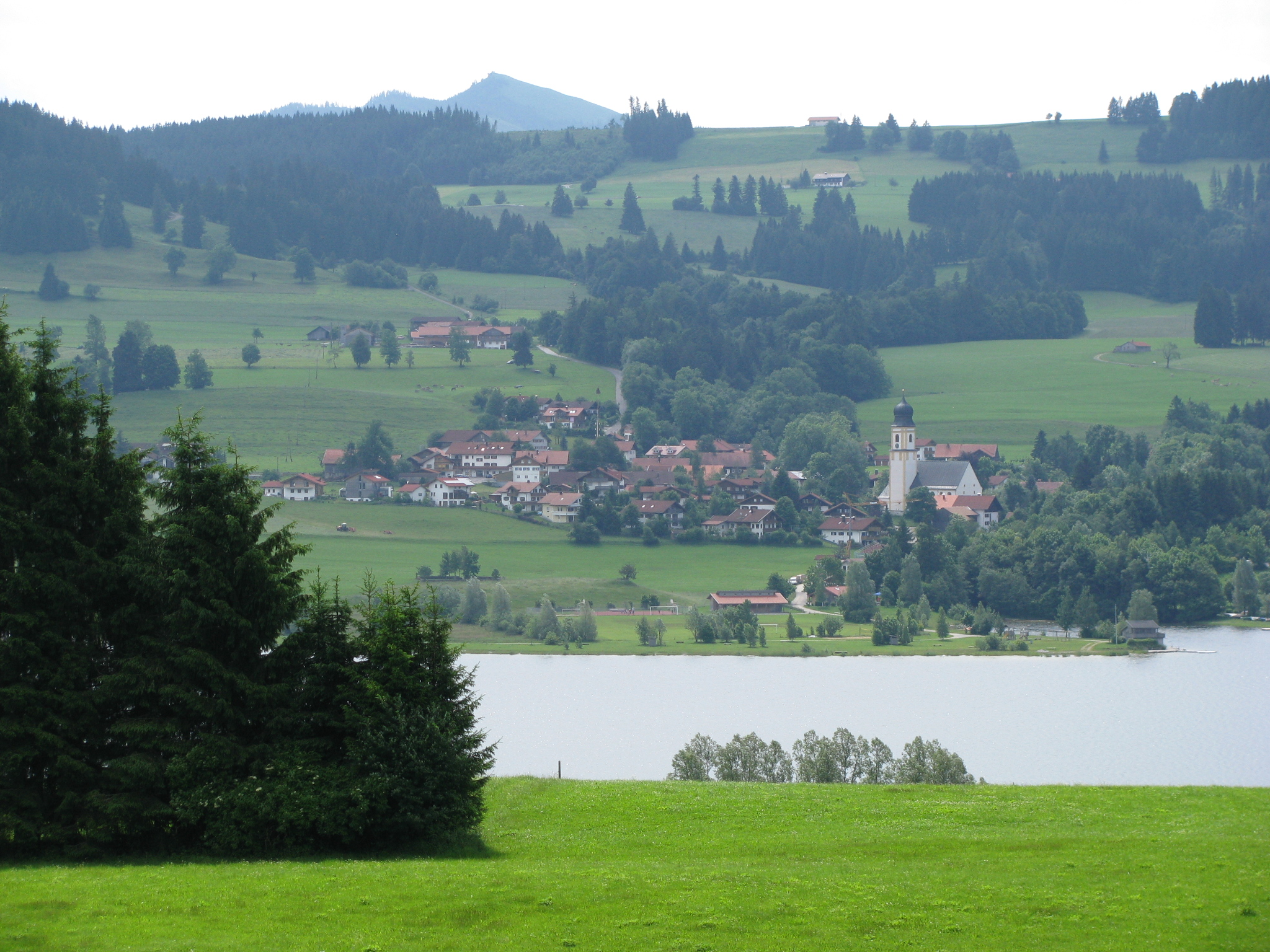 Petersthal mit Rottachsee im Vordergrund